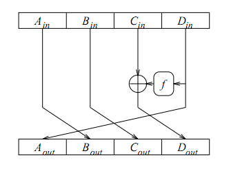 Прямое смешивание